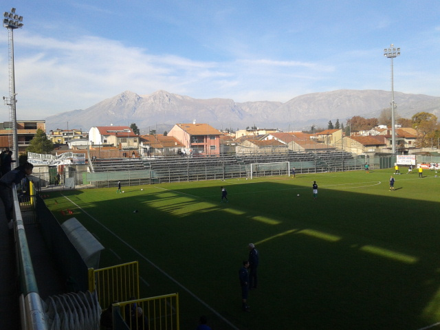 Stadio dei Marsi